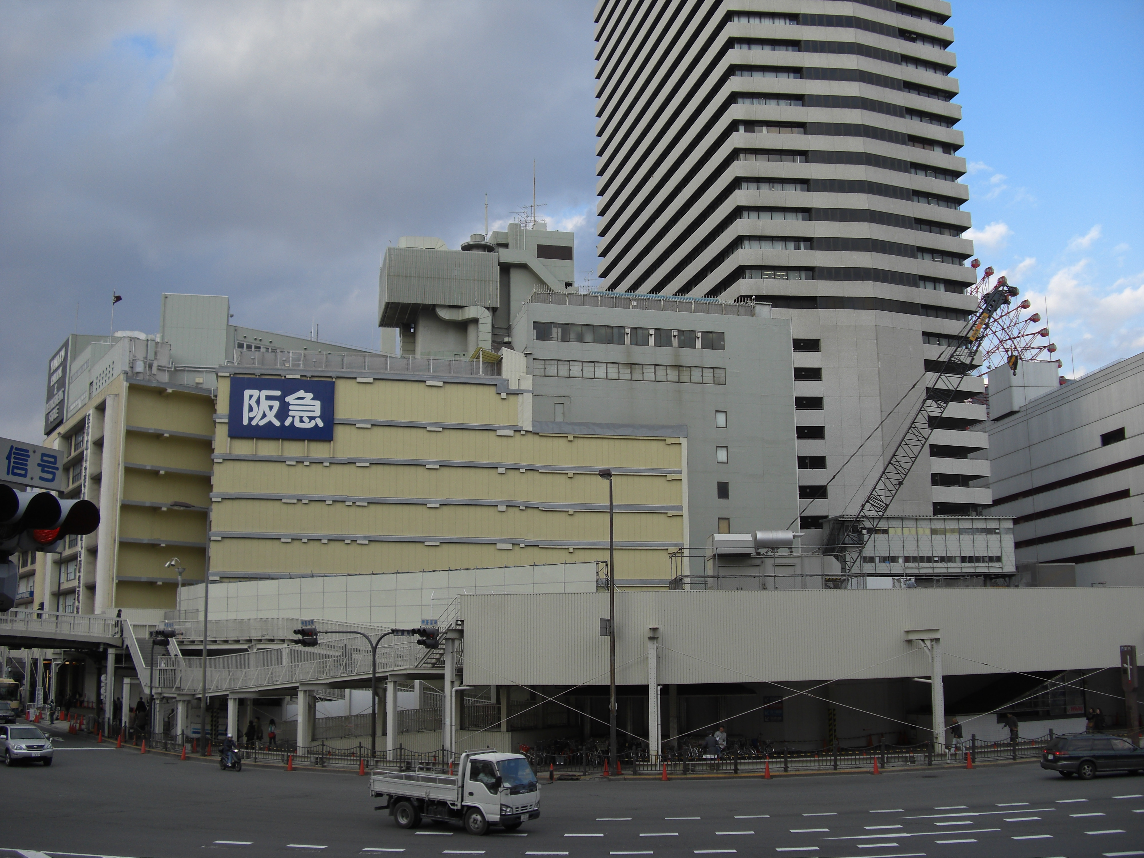 Hankyu Department Store,Kadotacho Kita-Ku Osaka-City Osaka Japan.